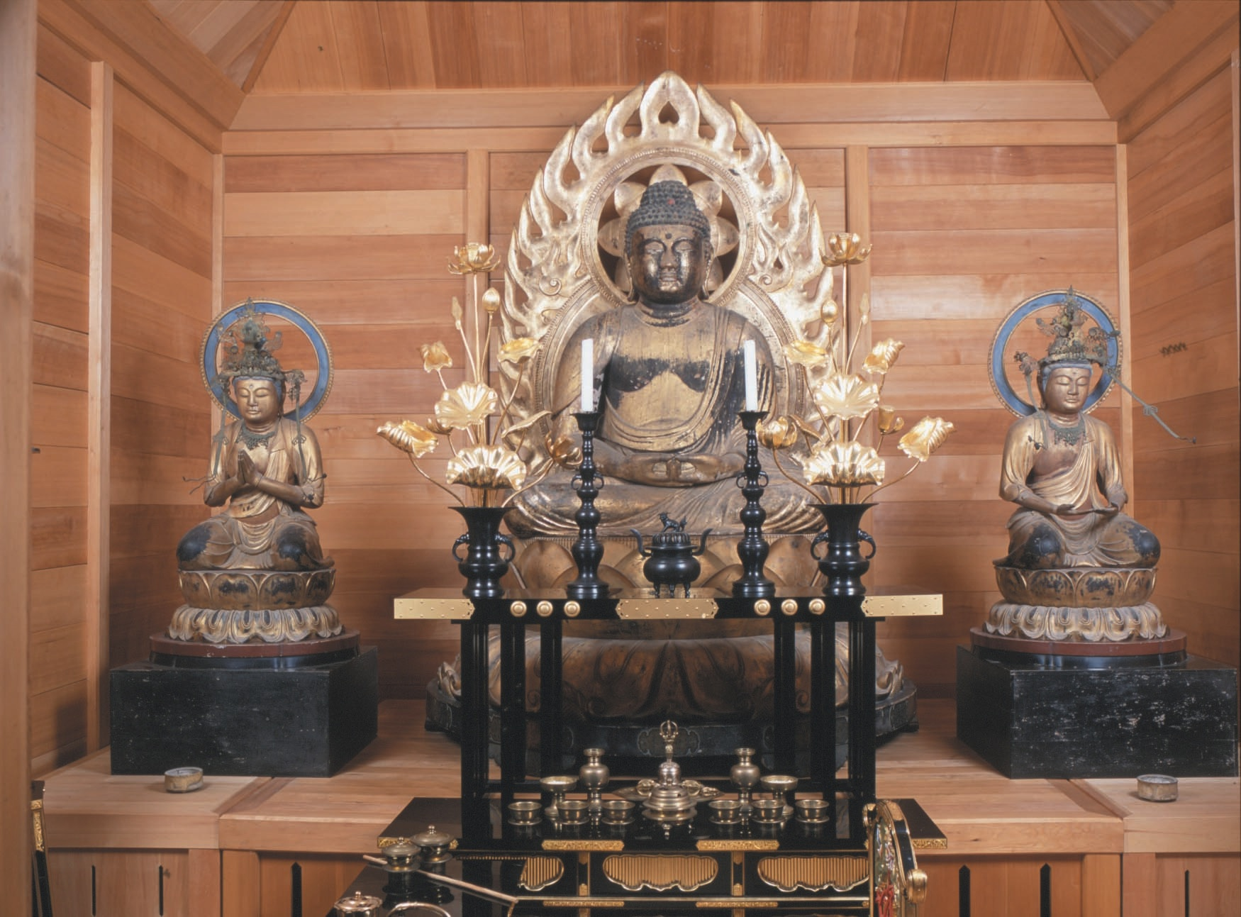 福王寺(佐久市)の阿弥陀如来像